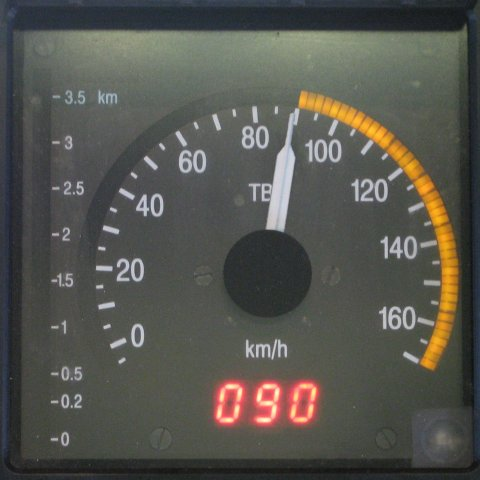 Affichage TBL2 dans une AM96.